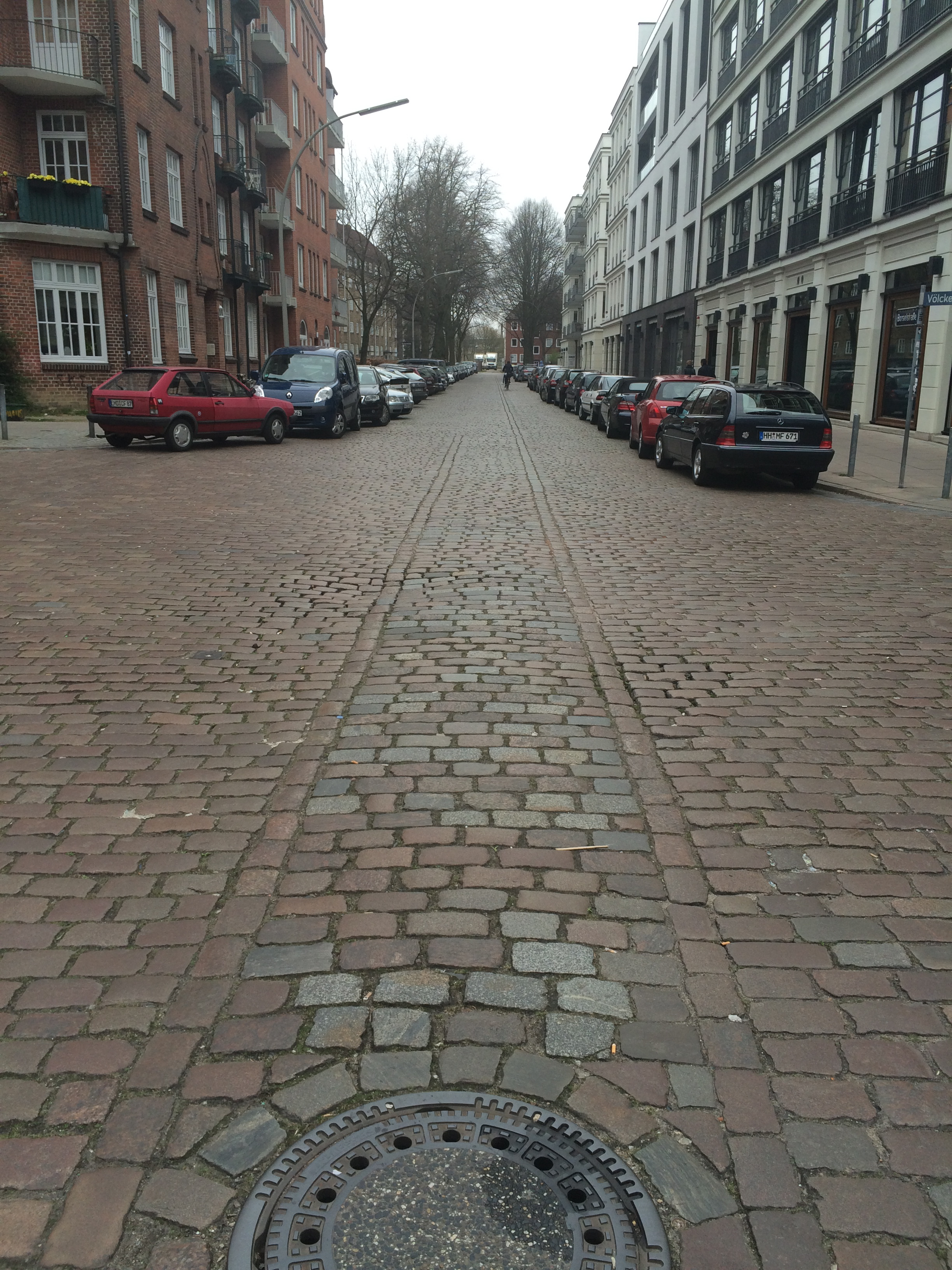 Spuren im Straßenpflaster der ehemaligen Ottensener Industriebahn, Borselstraße Ecke Planckstraße/Völckerstraße